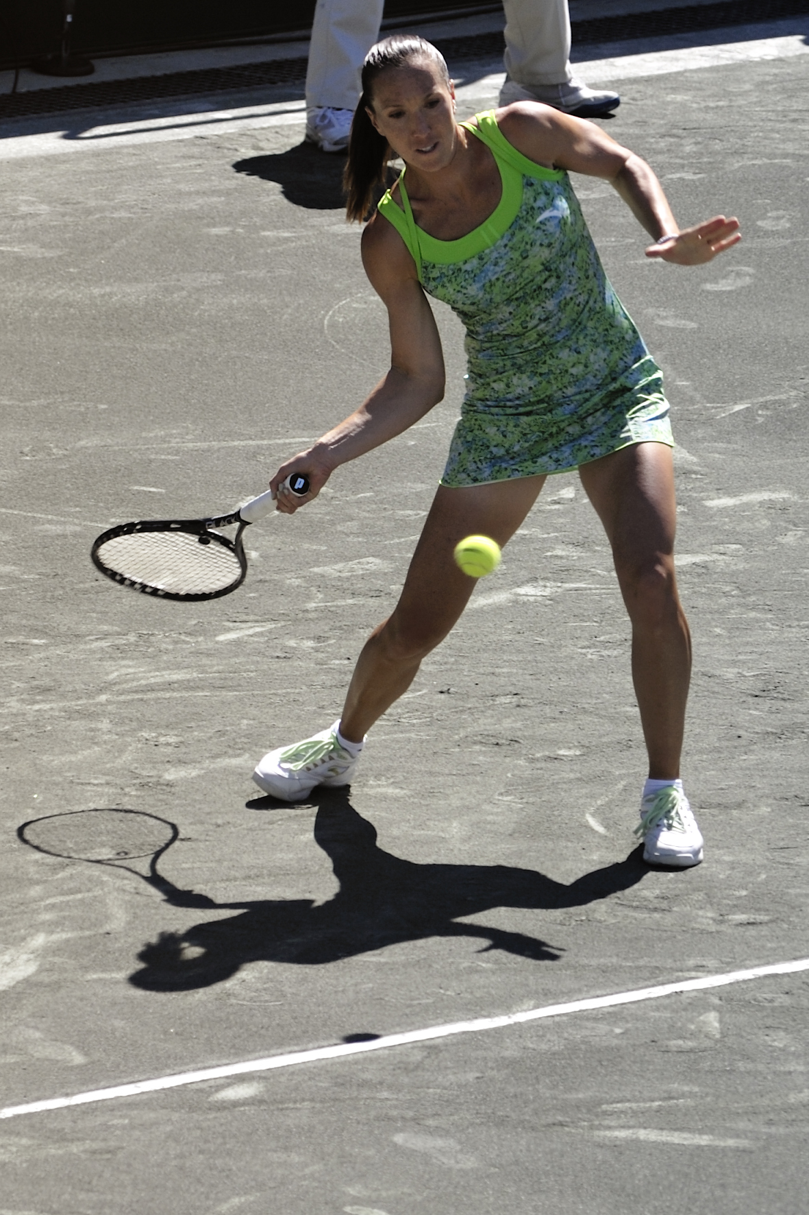 Emiliàn e rumagnòl: La Jelena Janković tòlta zò durànt la Family Circle Cup Tennis dal 2011